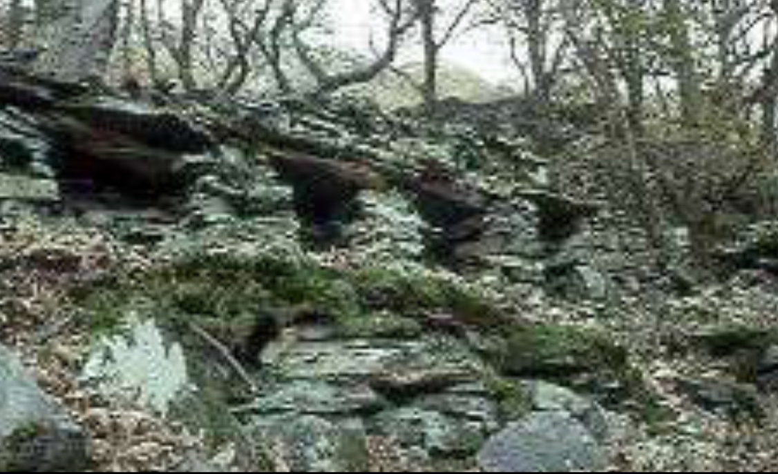 Nodwedd hanesyddol prin. Wal â thyllau ar gyfer cychod gwenyn. Mewn Gwarchodfa Natur Genedlaethol yng Ngwynedd.